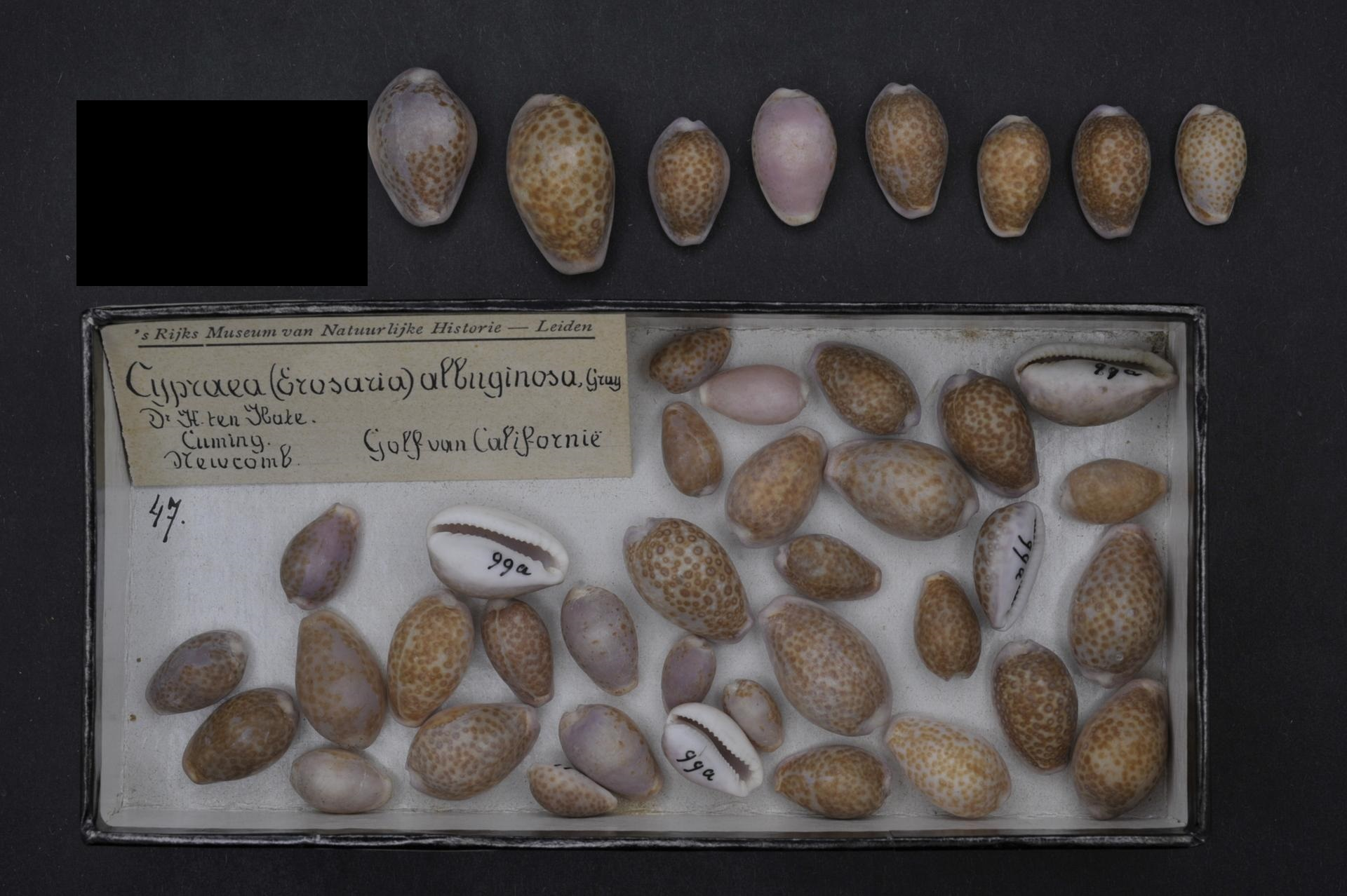 Erosaria albuginosa (Gray, 1825)